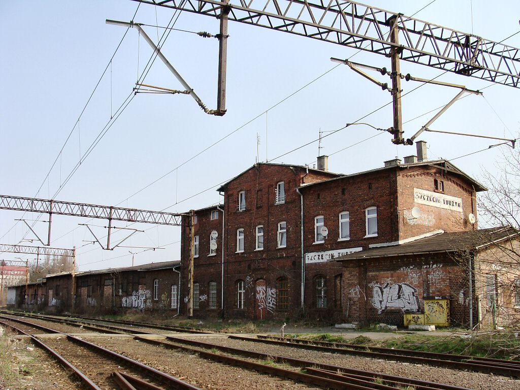 Nieczynny dworzec kolejowy Szczecin Turzyn